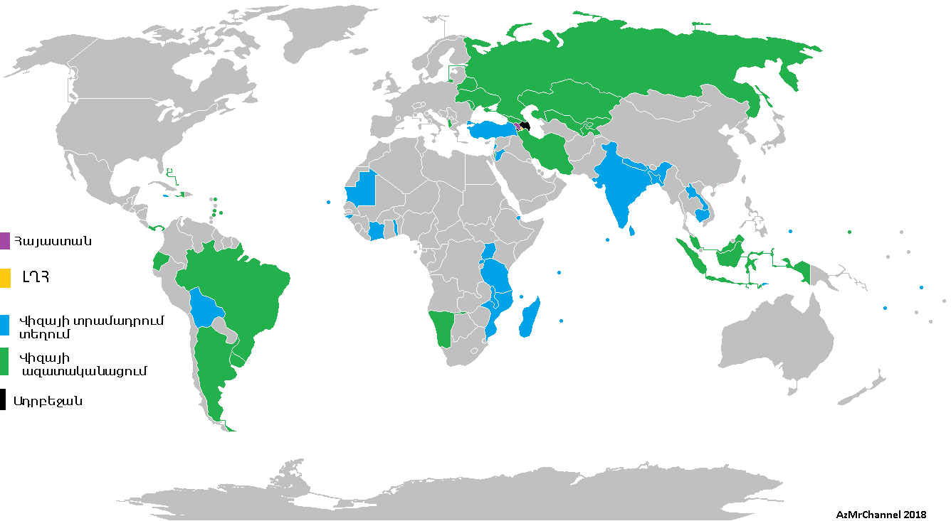 Կանաչ - Վիզայի ազատականացում, կապույտ - վիզան տրամադրվում է տեղում